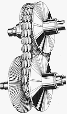 PIV-Getriebe aus Das Buch vom Metall von Büdeler Naumann 1961 Lizenz GNU